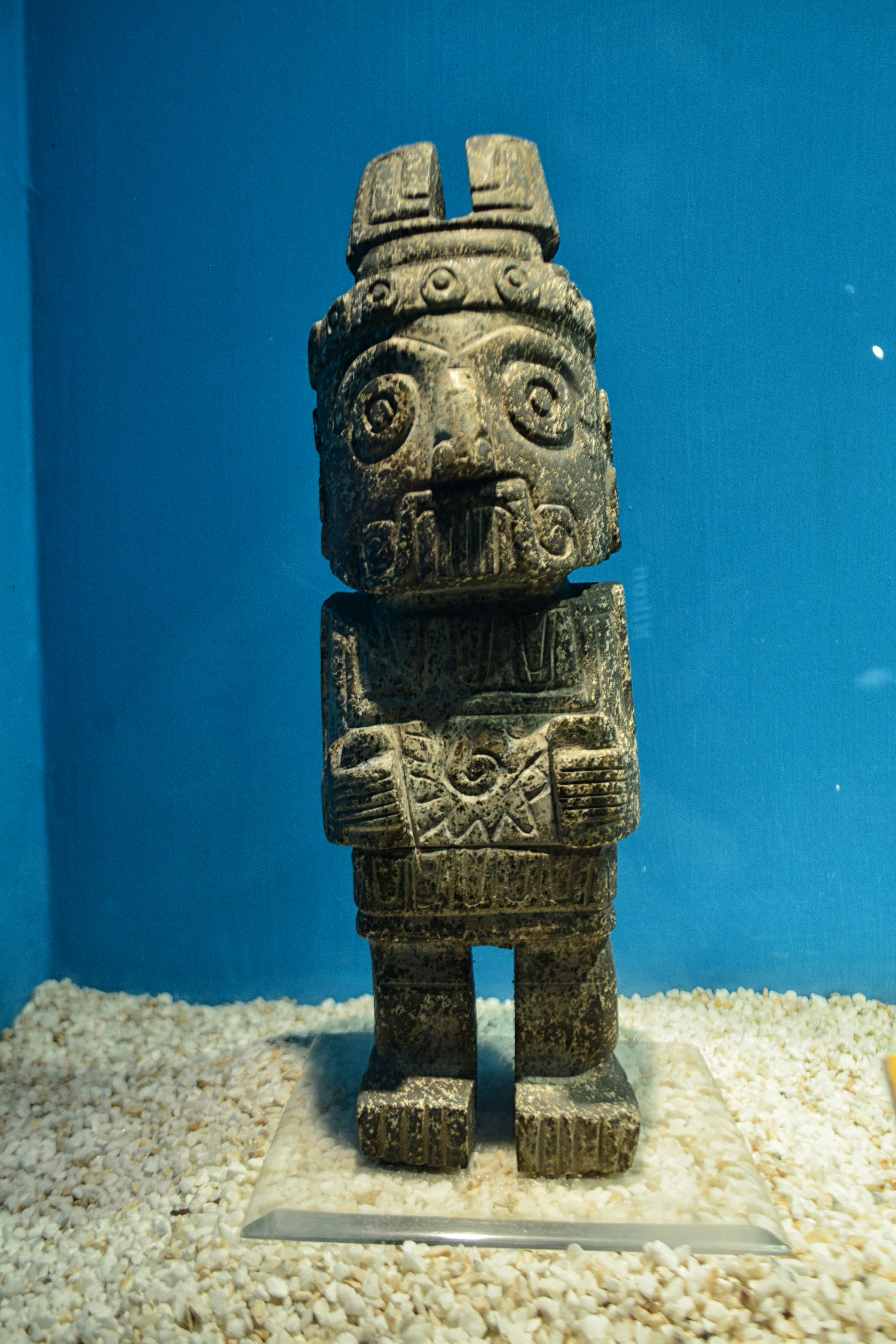 Sala 6: Flora y Fauna,Museo del Templo Mayor, Ciudad de México